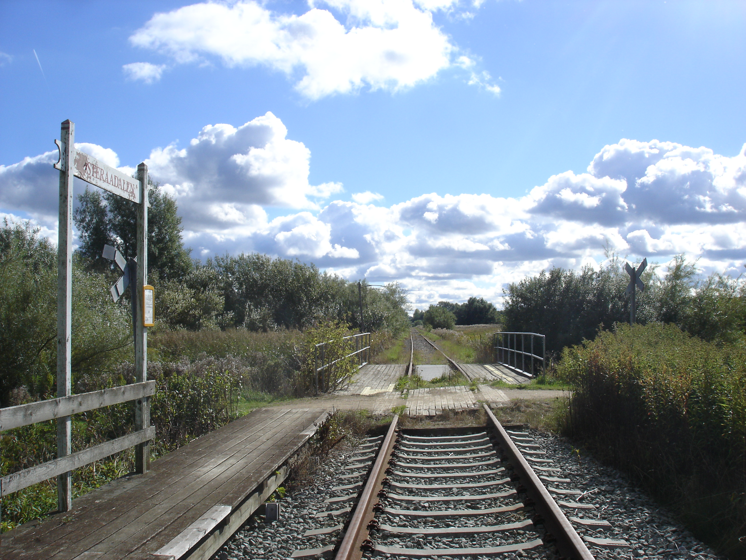 Aalborg Havnebane på Hadsundbanens tracé krydser Østerå